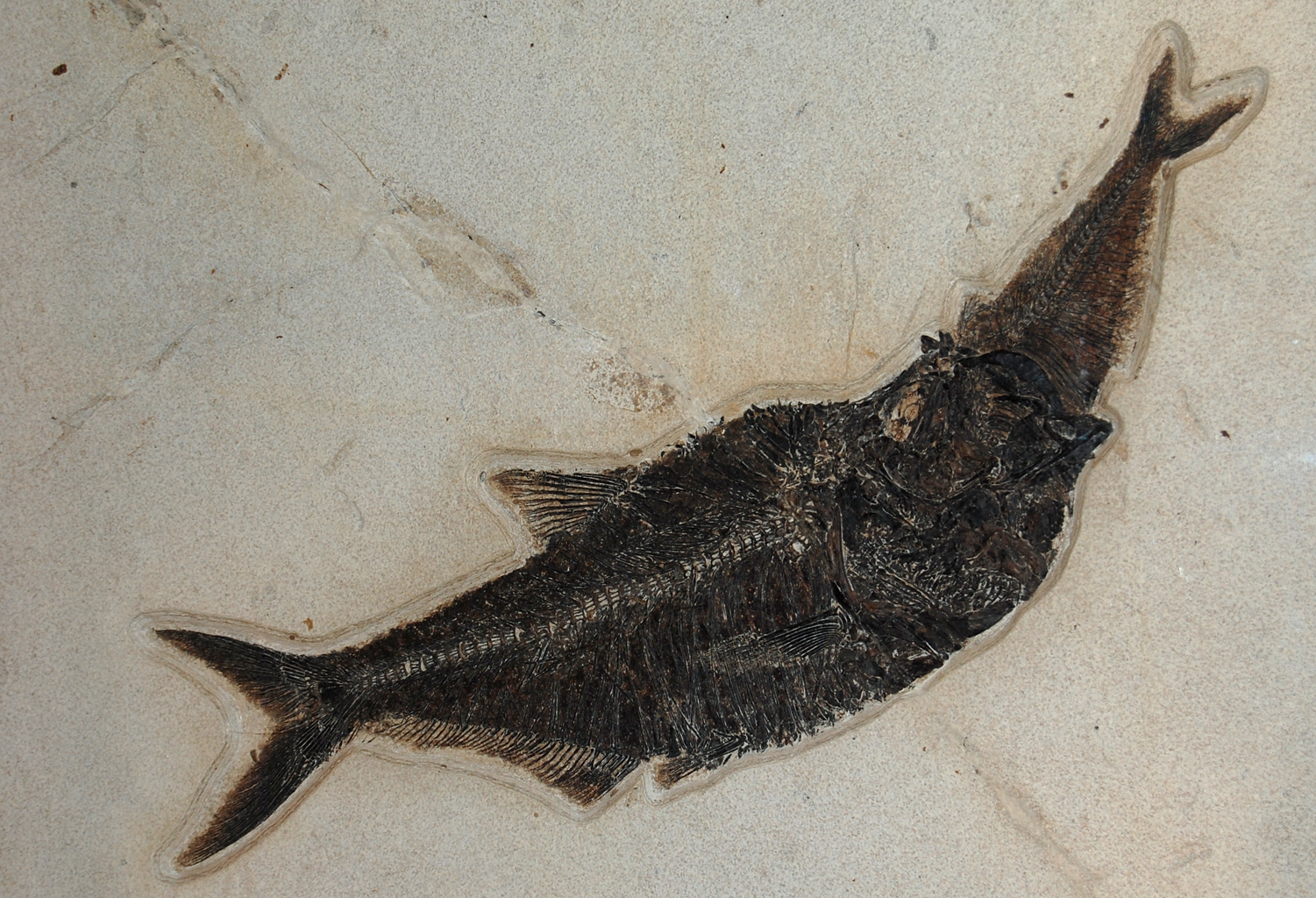 Naturhistorisches Museum Wien